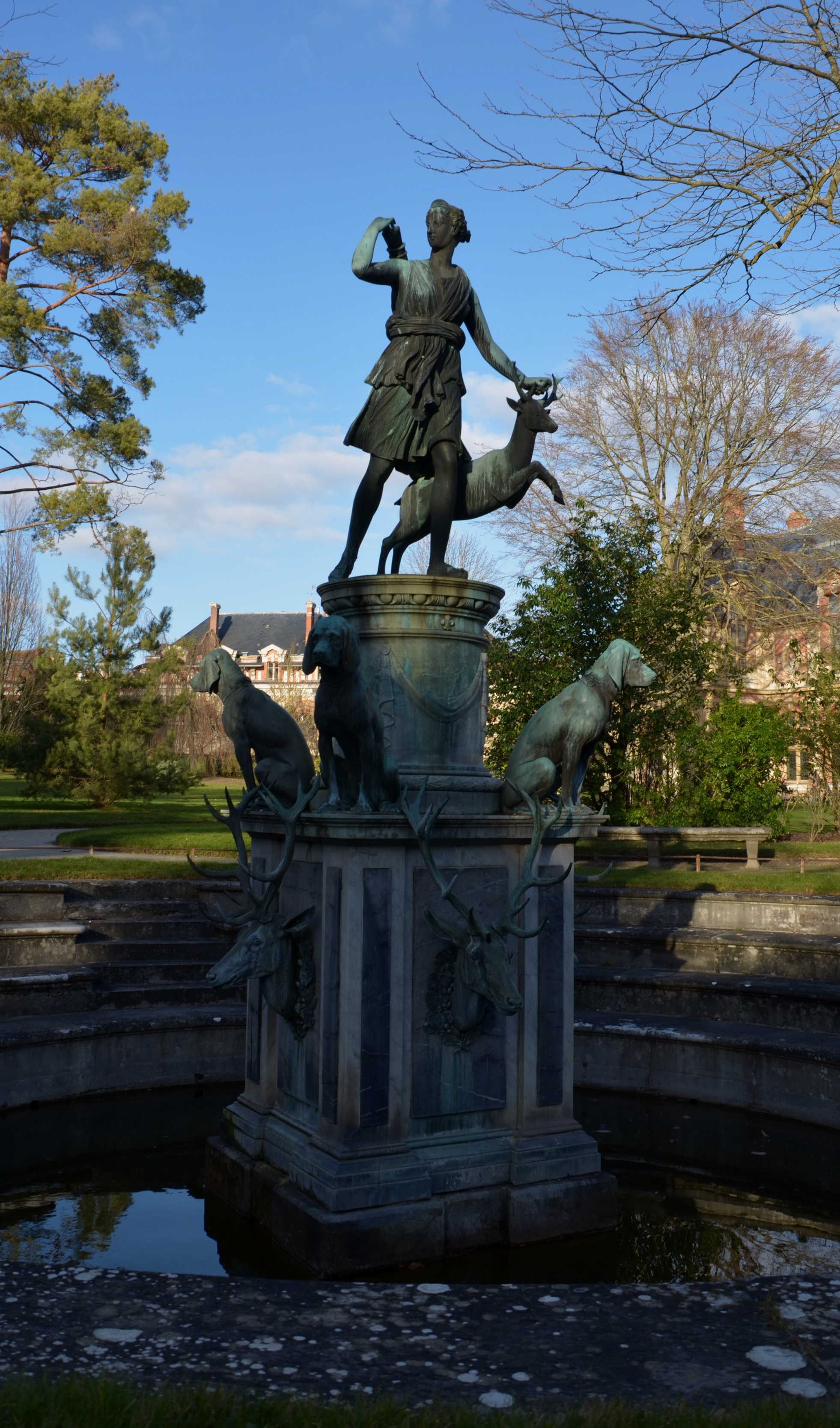 Diane à la biche, Barthélemy Prieur, 1684